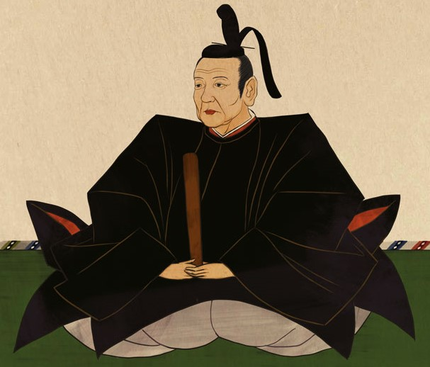 水野勝俊の肖像(想像)。